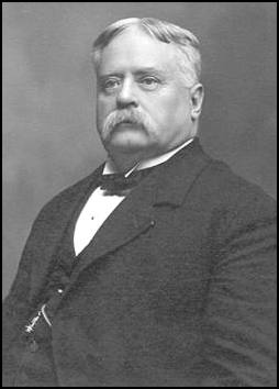 Fitzhugh Lee